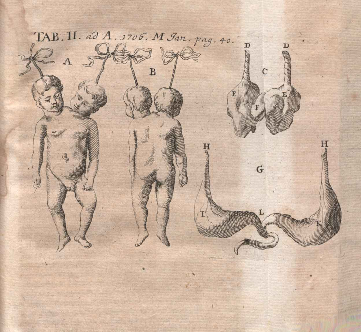 Illustration